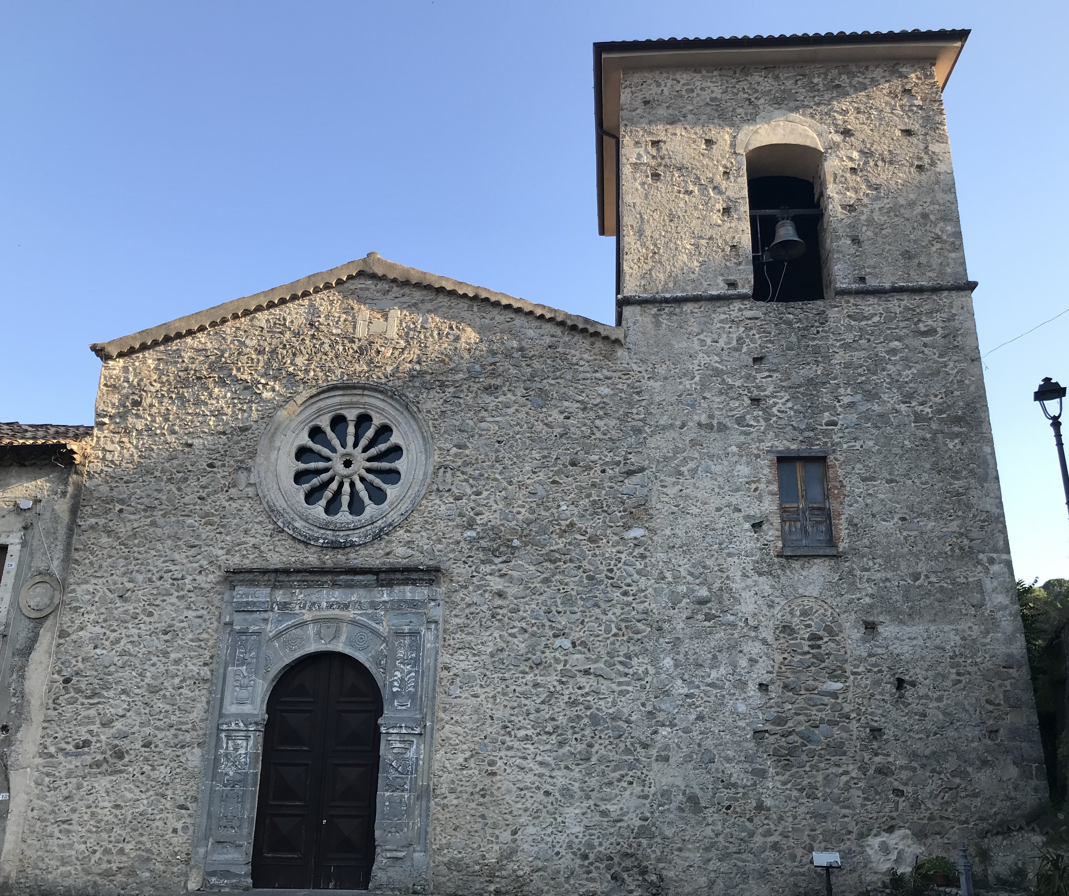 Chiesa di Santa Maria del Soccorso a Caccuri